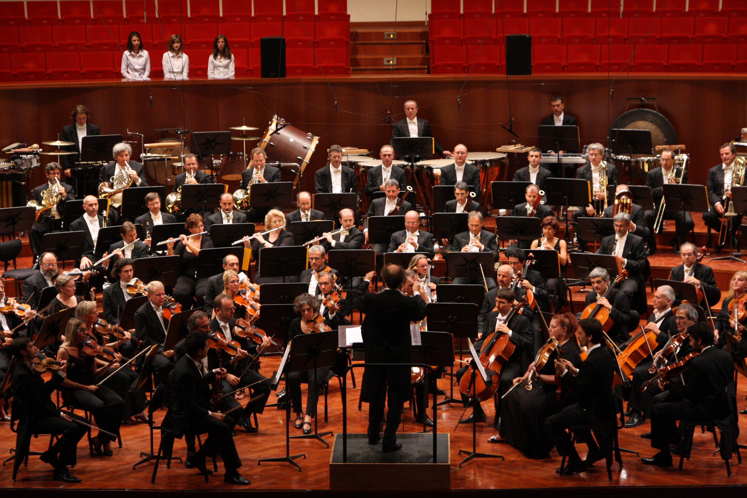 MITO SettembreMusica - Auditorium Rai - Orchestra Sinfonica Nazionale della Rai - Peter Rundel, direttore - James Sommerville, corno - Håkan Hardenberger, tromba